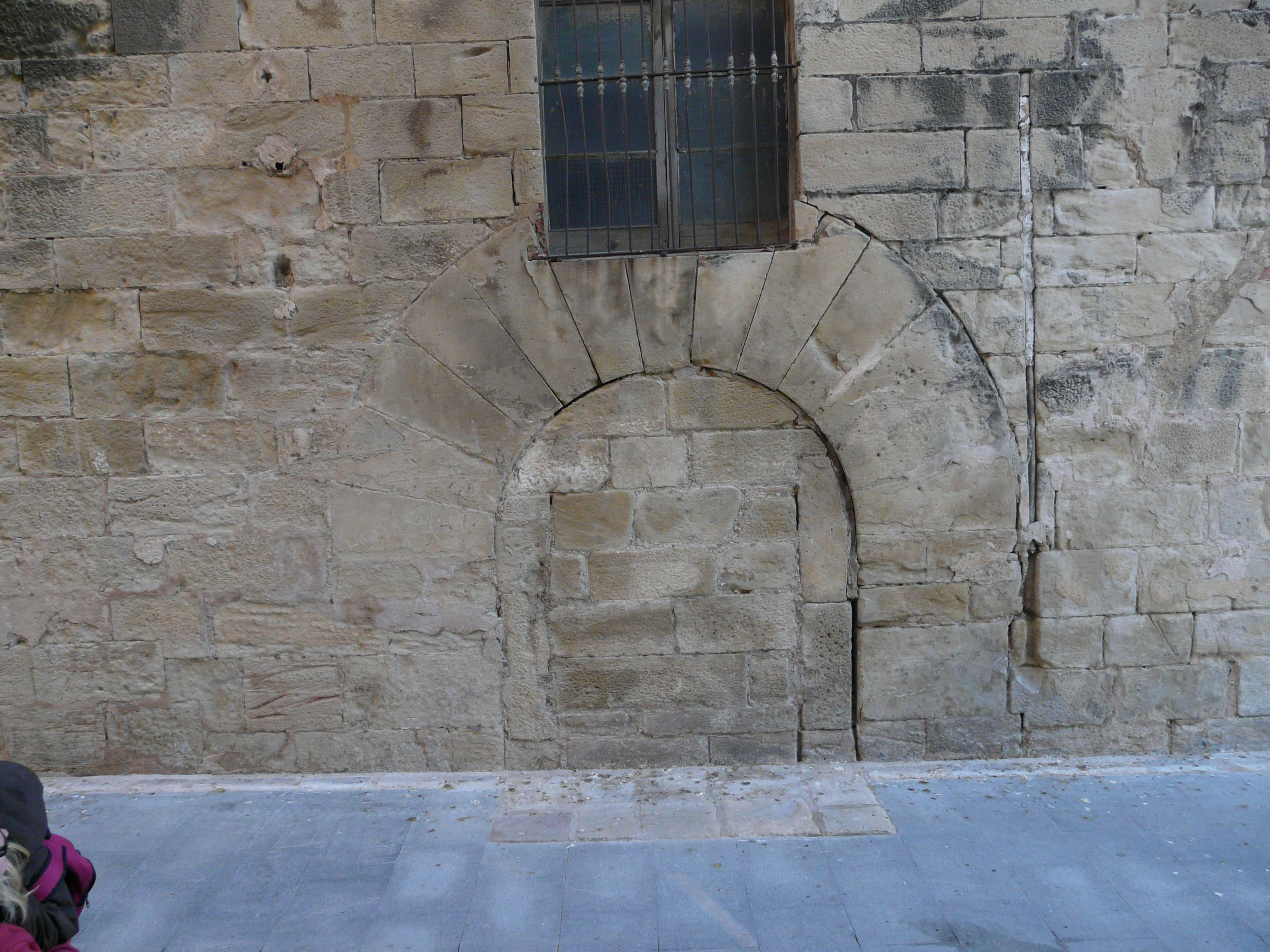 Antiga Casa de la Generalitat (Tortosa) Object location40° 48′ 48.96″ N, 0° 31′ 15.85″ E